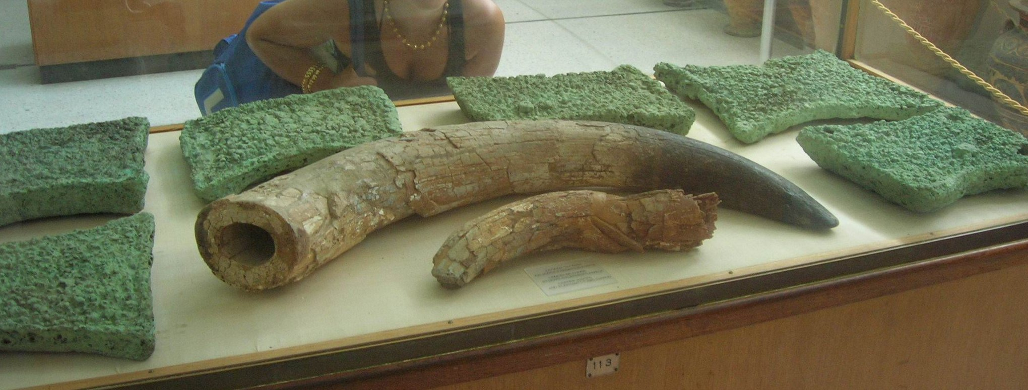 Museu arqueològic de Creta a Heràkleion, foto feta per J. Ollé el 6 d'agost del 2005.